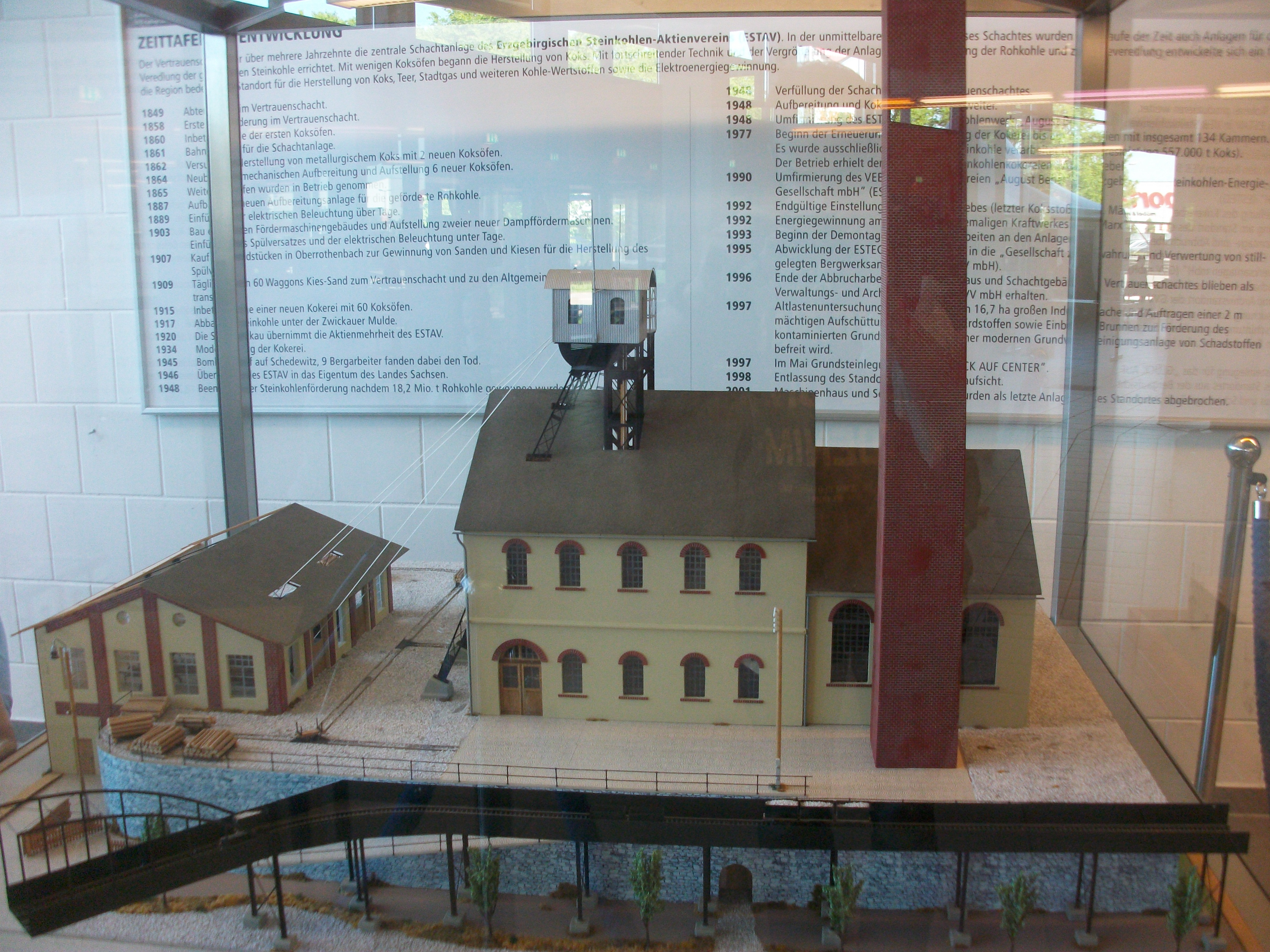 Modell des abgerissenen Vertrauenschachtes in Schedewitz in der Stadthalle Zwickau